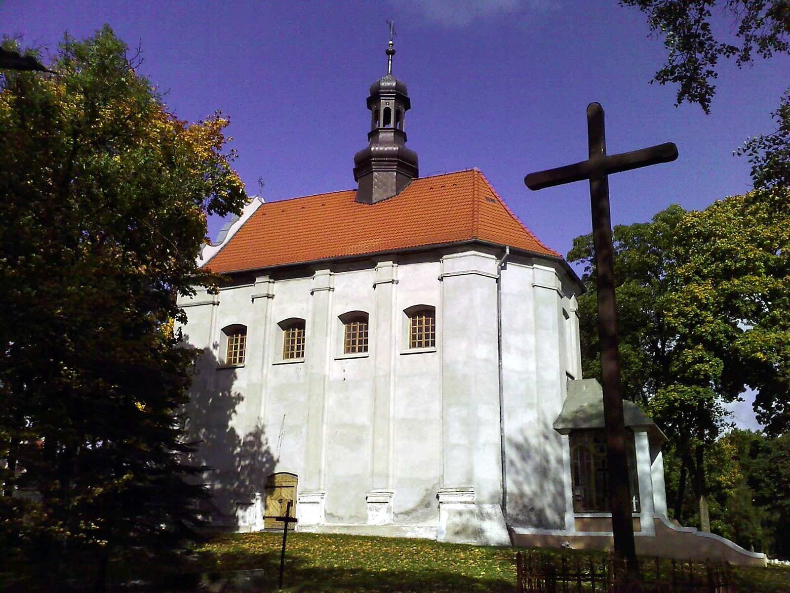 Pakość - XVII-wieczna kalwaria fundacji Działyńskich